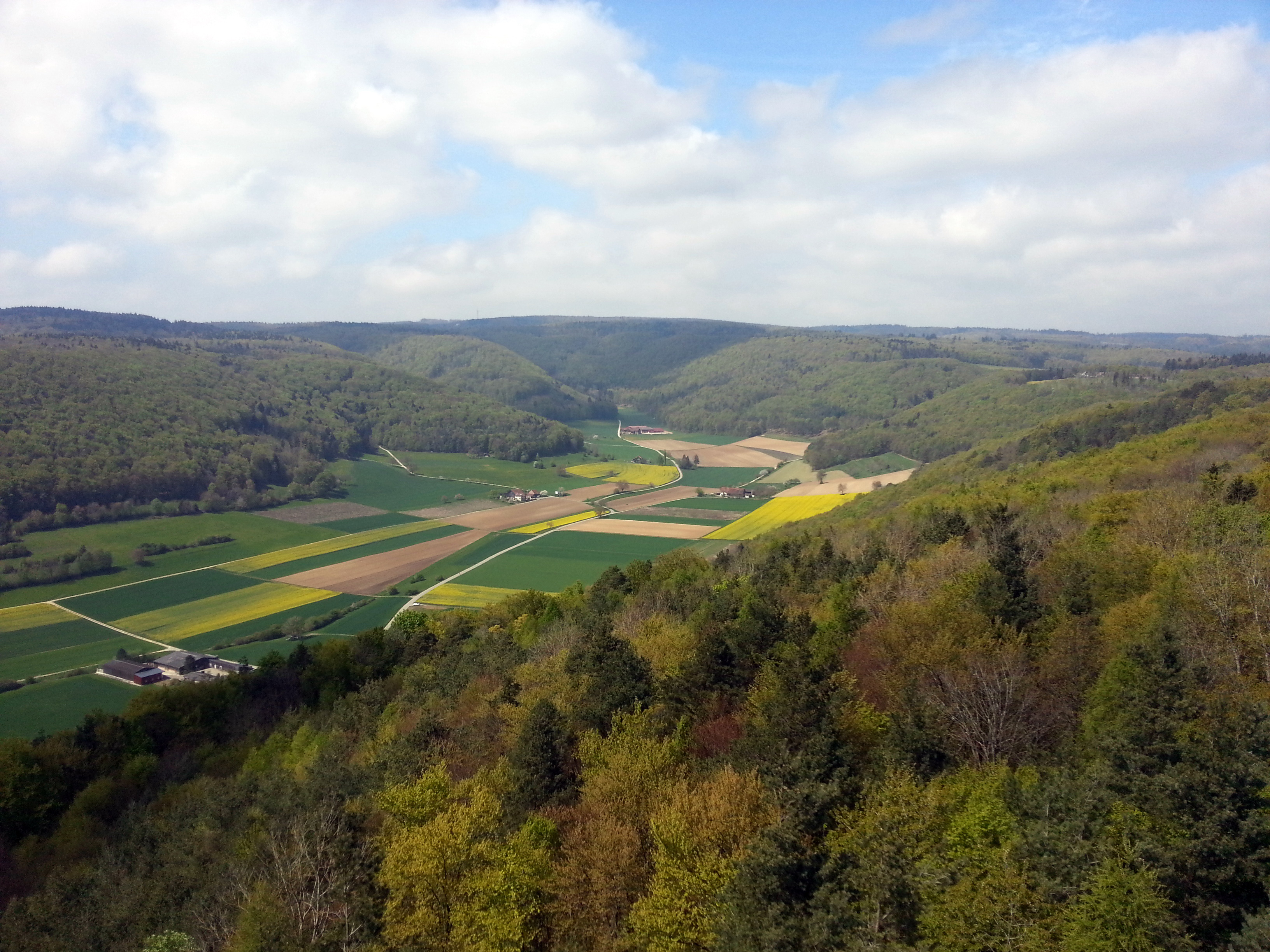 Beringer Randenturm Richtung Lieblosental